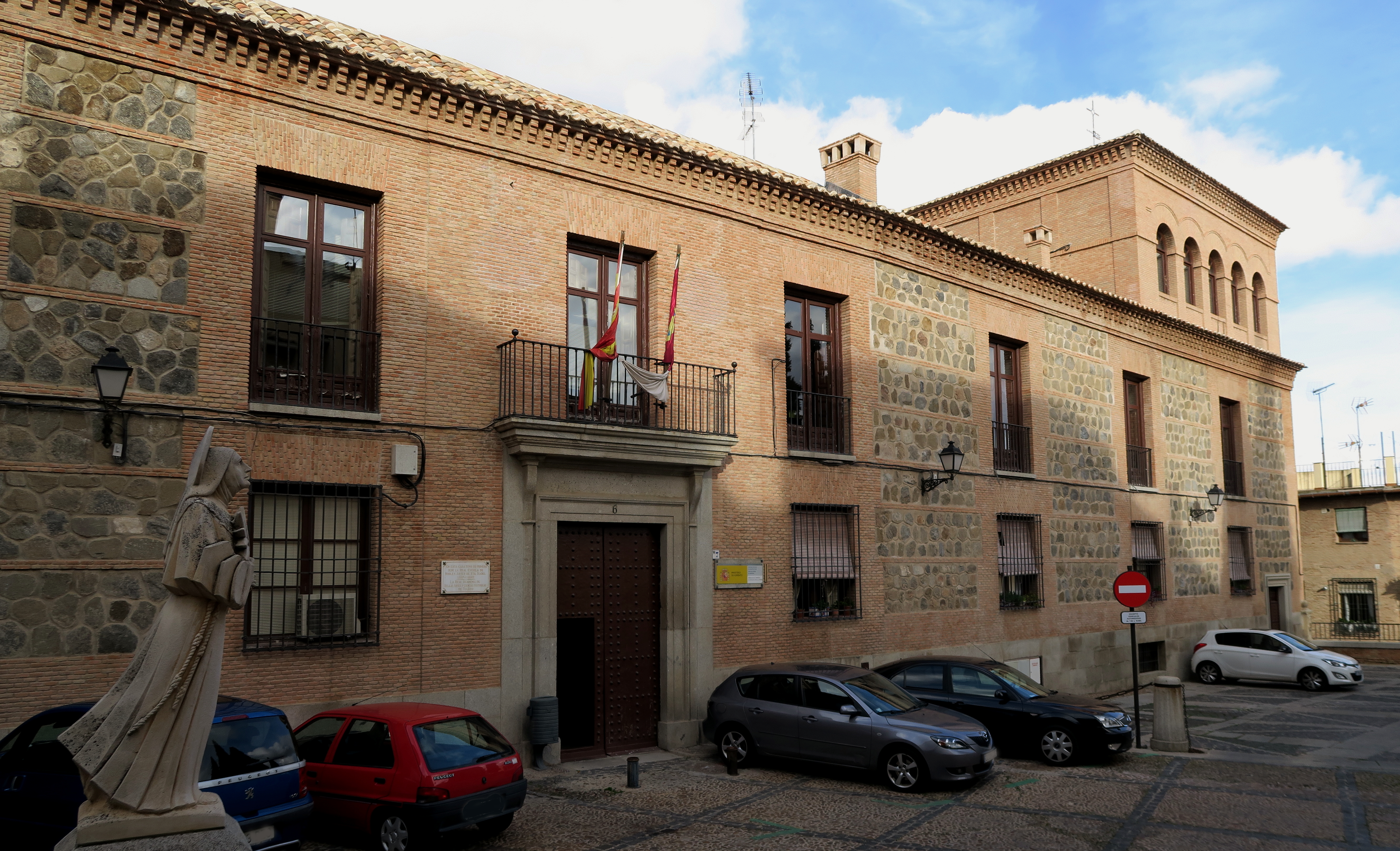 Fachada principal del Palacio del Marqués de Malpica, Toledo